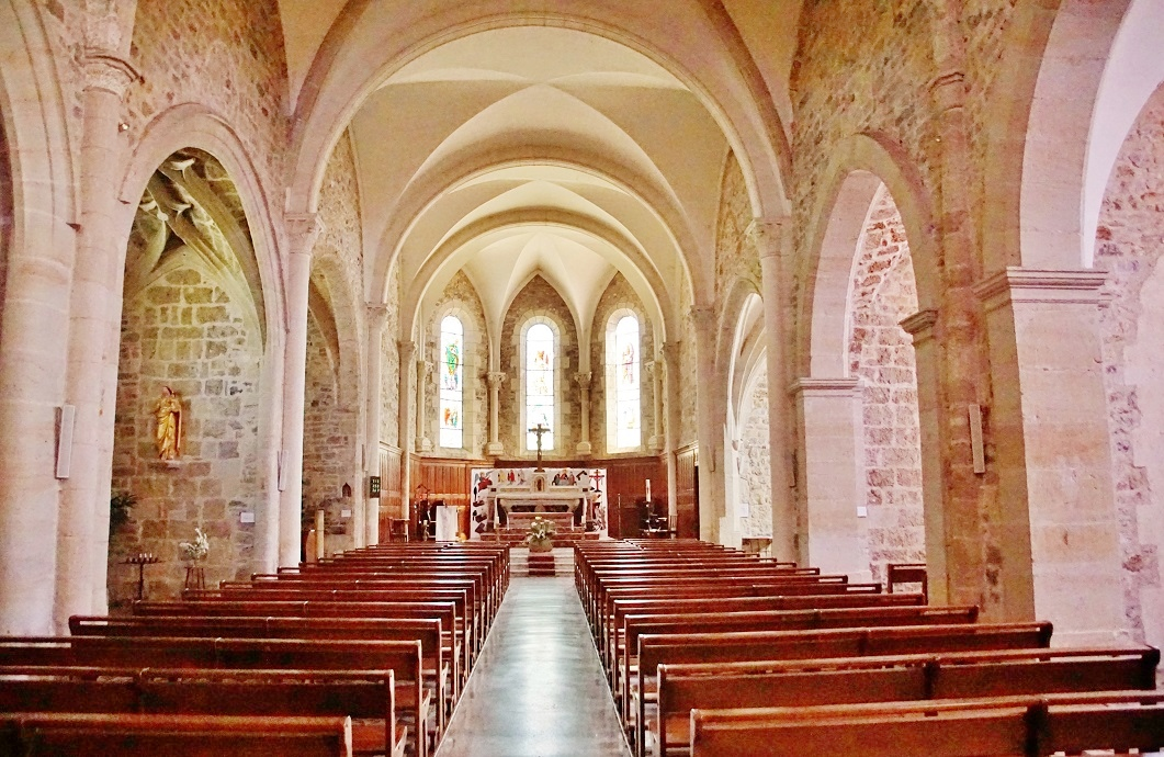 église saint-Julien